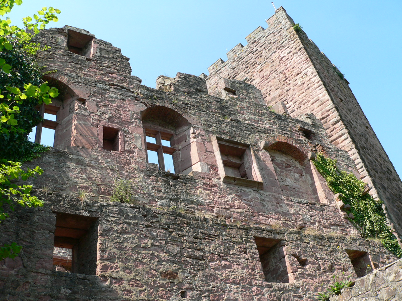 Henneburg oberhalb von Stadtprozelten am Main, Germany - östlicher Palas